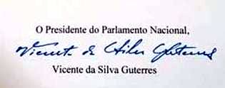 Assinatura de Vicente da Silva Guterres como presidente do Parlamento Nacional de Timor-Leste.